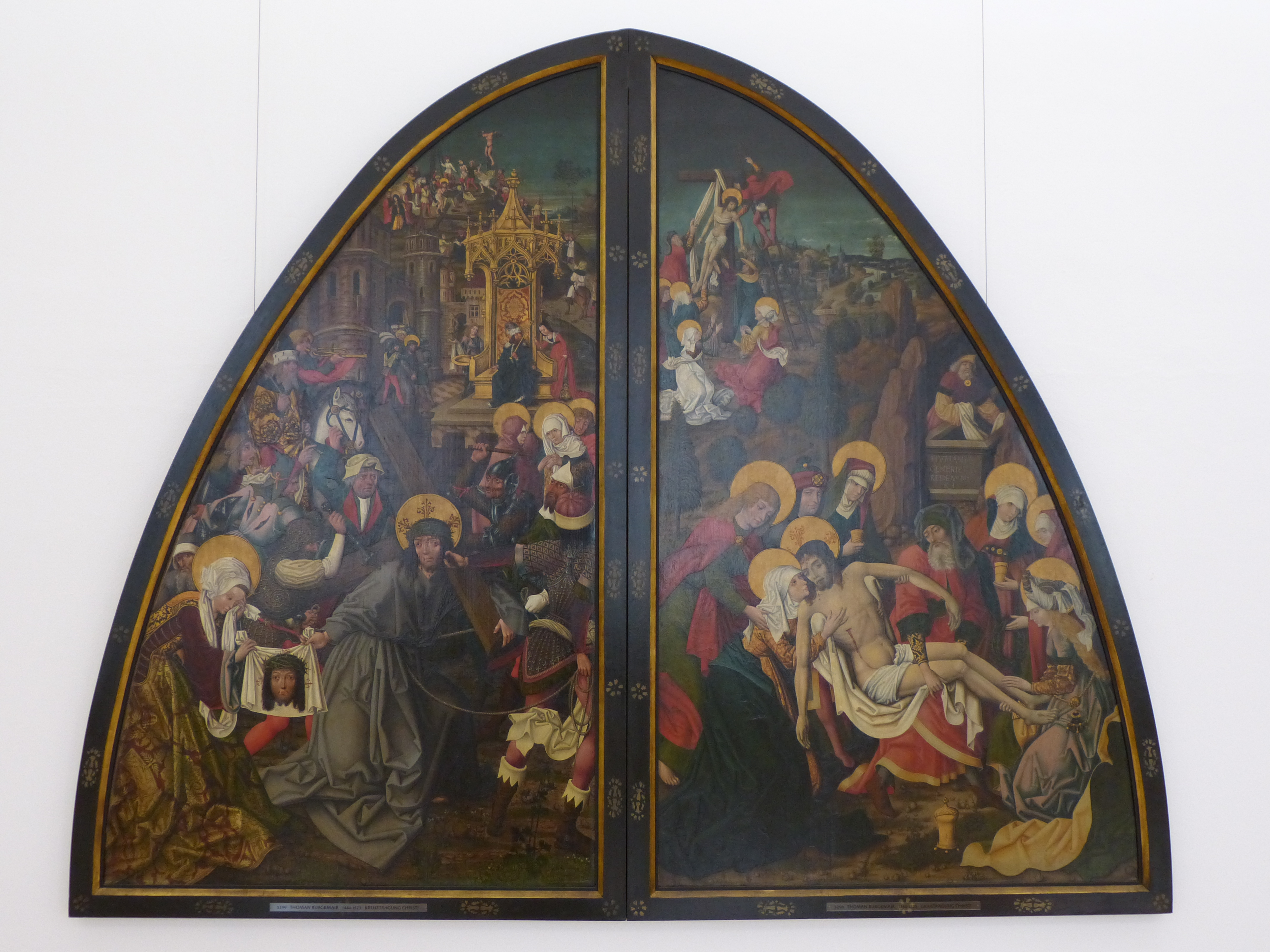 Thomas Burgkmair - Kreuztragung Christi Staatsgalerie Altdeutsche Meister (Augsburg) Native nameStaatsgalerie Altdeutsche MeisterLocationAugsburg, GermanyCoordinates48° 21′ 54″ N, 10° 53′ 57″ E Established1835Websitepinakothek.de (staatsgalerie-augsburg)